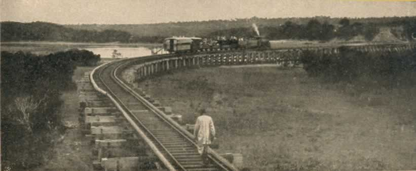 Ugandabahn: Kurve bei Mombasa